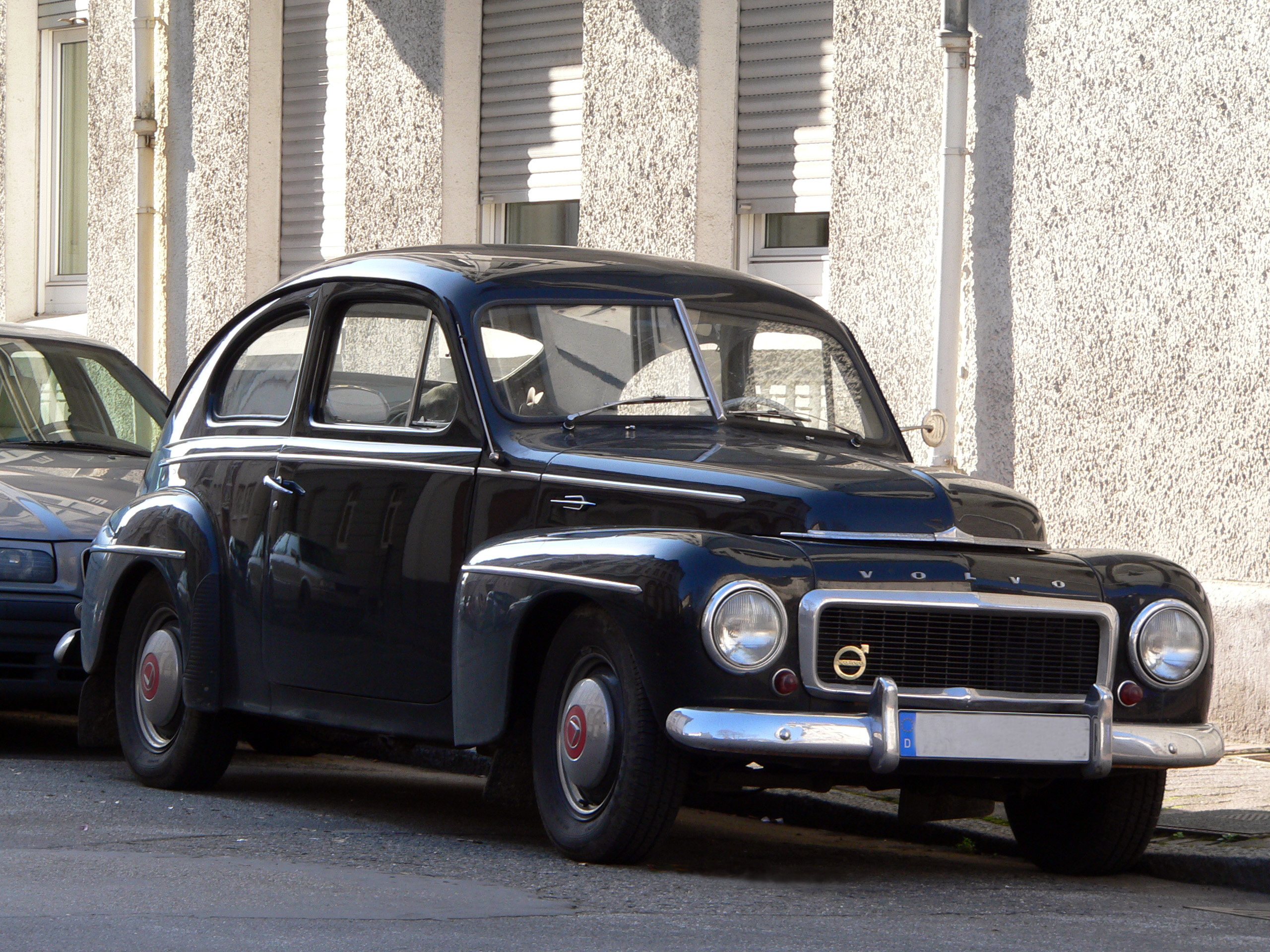 Volvo PV444